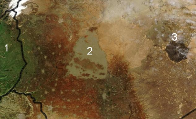 1. רמת הגולן, ישראל 2. אל-אג'ה, סוריה 3. אל-סבאה, סוריה.